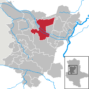 Haldensleben in Saxony-Anhalt (Country) - District (Landkreis) Börde